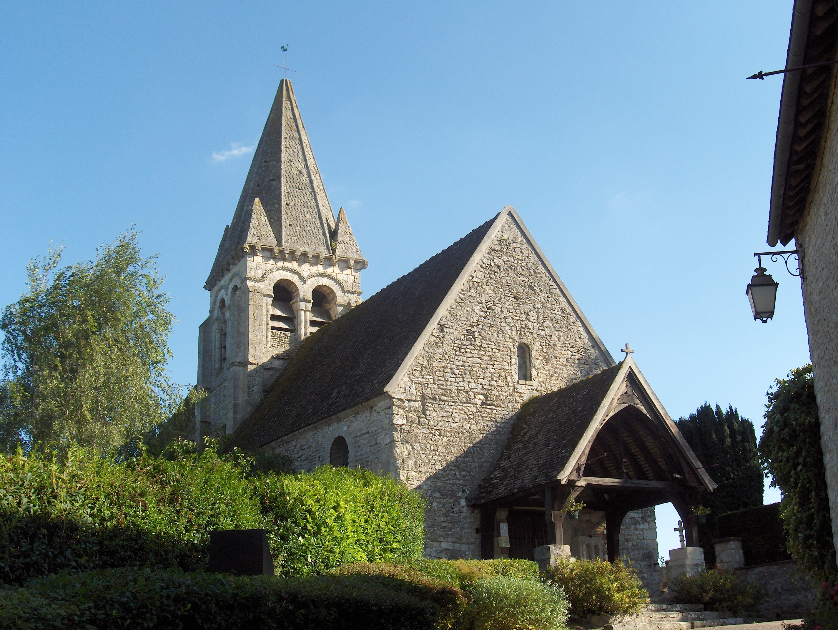 Vue depuis le nord-ouest.